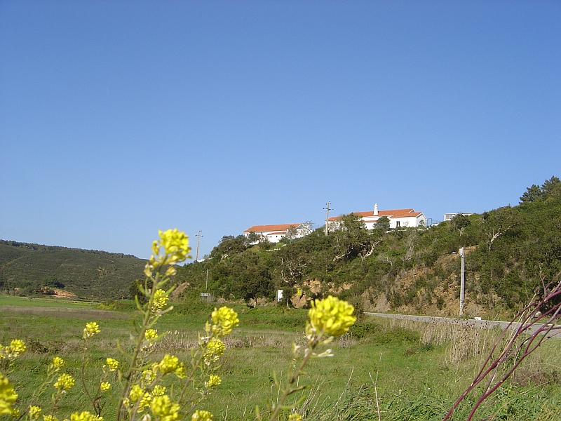 Odeceixe, Aljezur, Algarve, Portugal